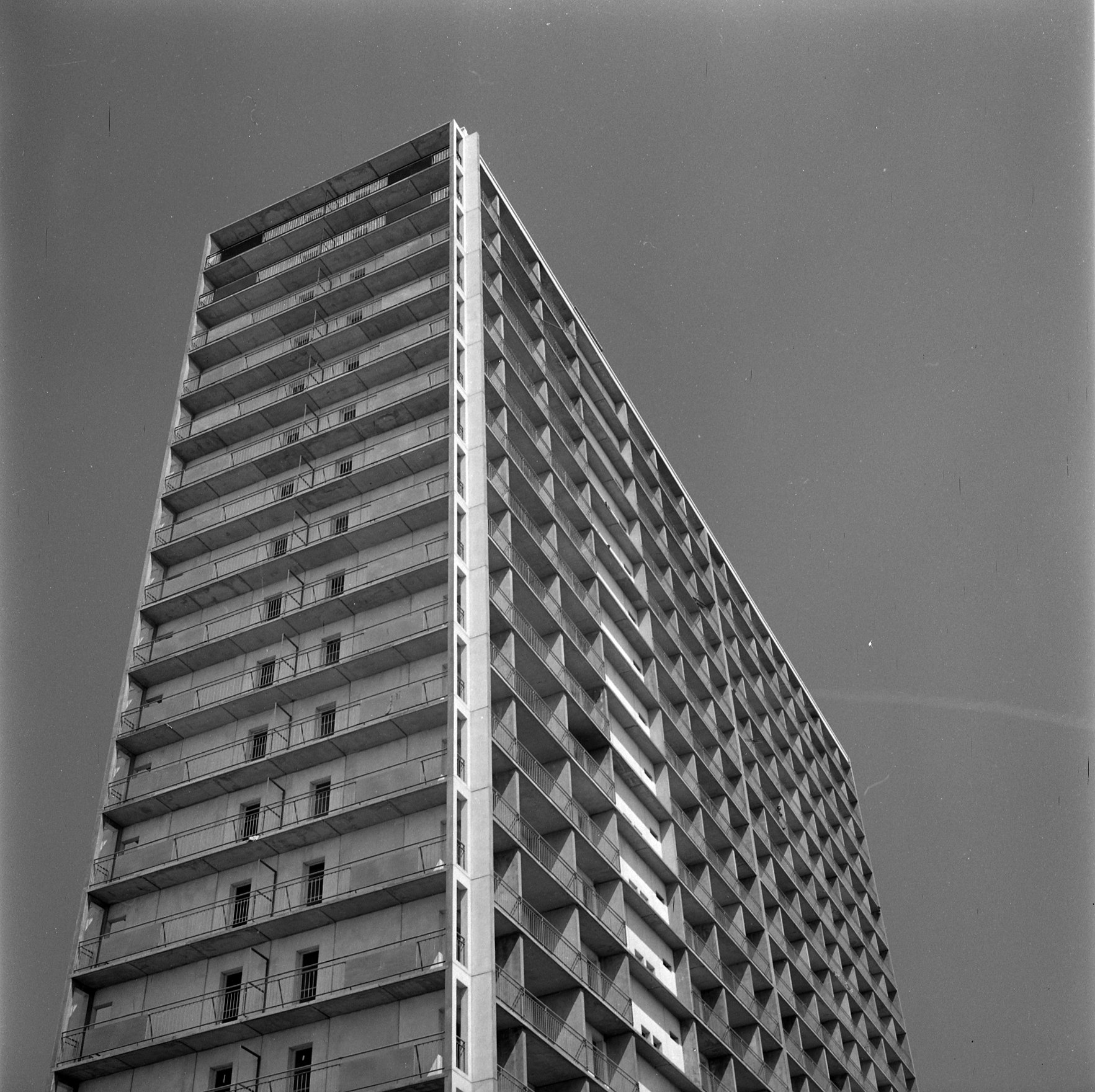 Quartier de Bagatelle. Le 27 Avril 1964. Vue d'une construction d'immeuble dans le quartier de Bagatelle.